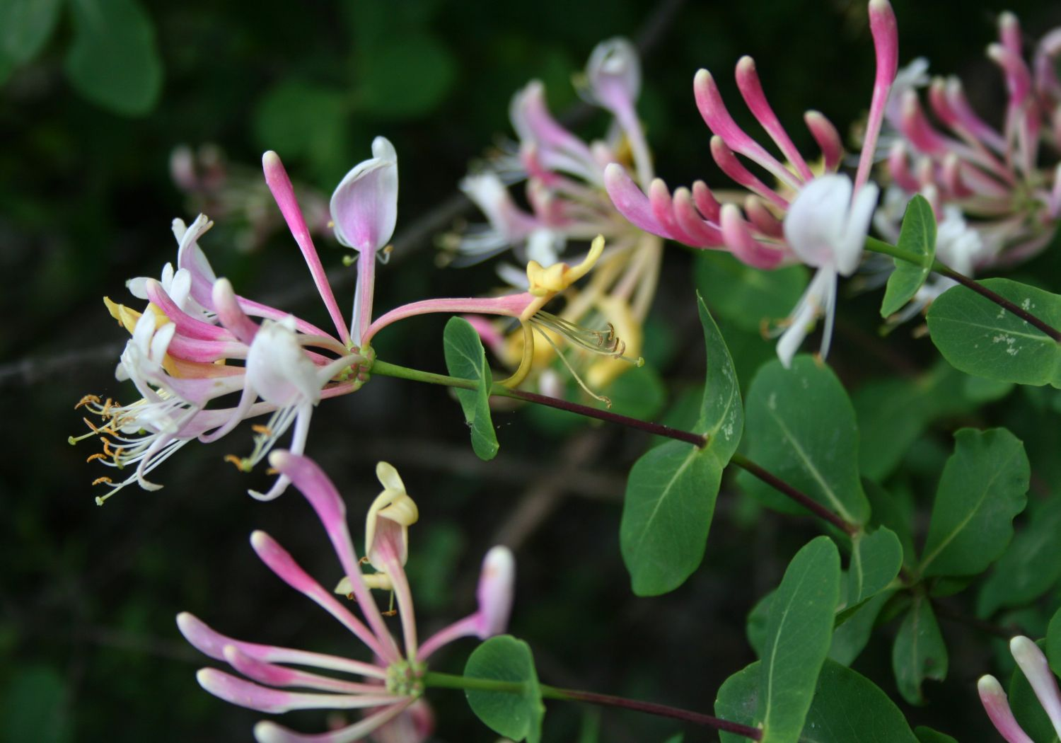 Lonicera etrusca, Geißblattgewächse (Caprifoliaceae) - Italien/Italia/Italy: Friuli-Venezia Giulia, Prov. Trieste, Rilkeweg/Sentiero Rilke von Sistiana nach Duino